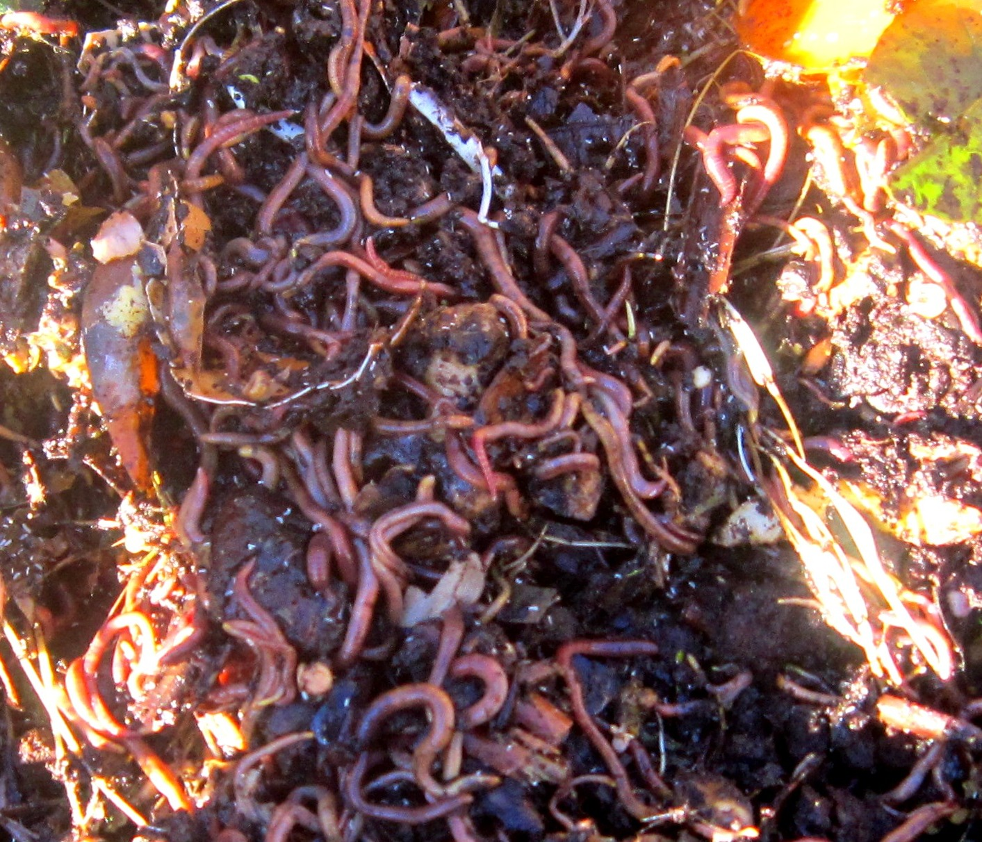 Aro da kompoŝtvermoj (Eisenia foetida)